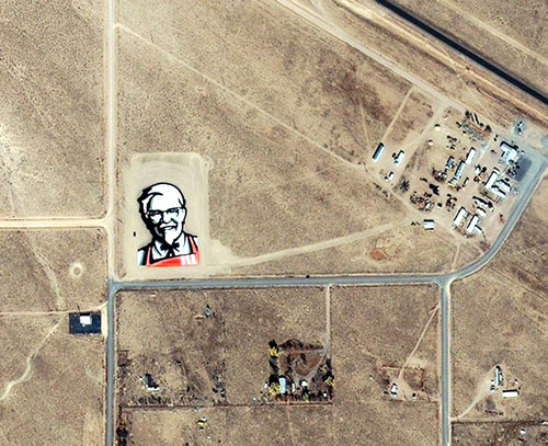 Logo KFC géant (8128,75 m²) dans le désert du Nevada dans la petite ville de Rachel (Nevada) située près de la fameuse Zone 51, photographié depuis l'espace